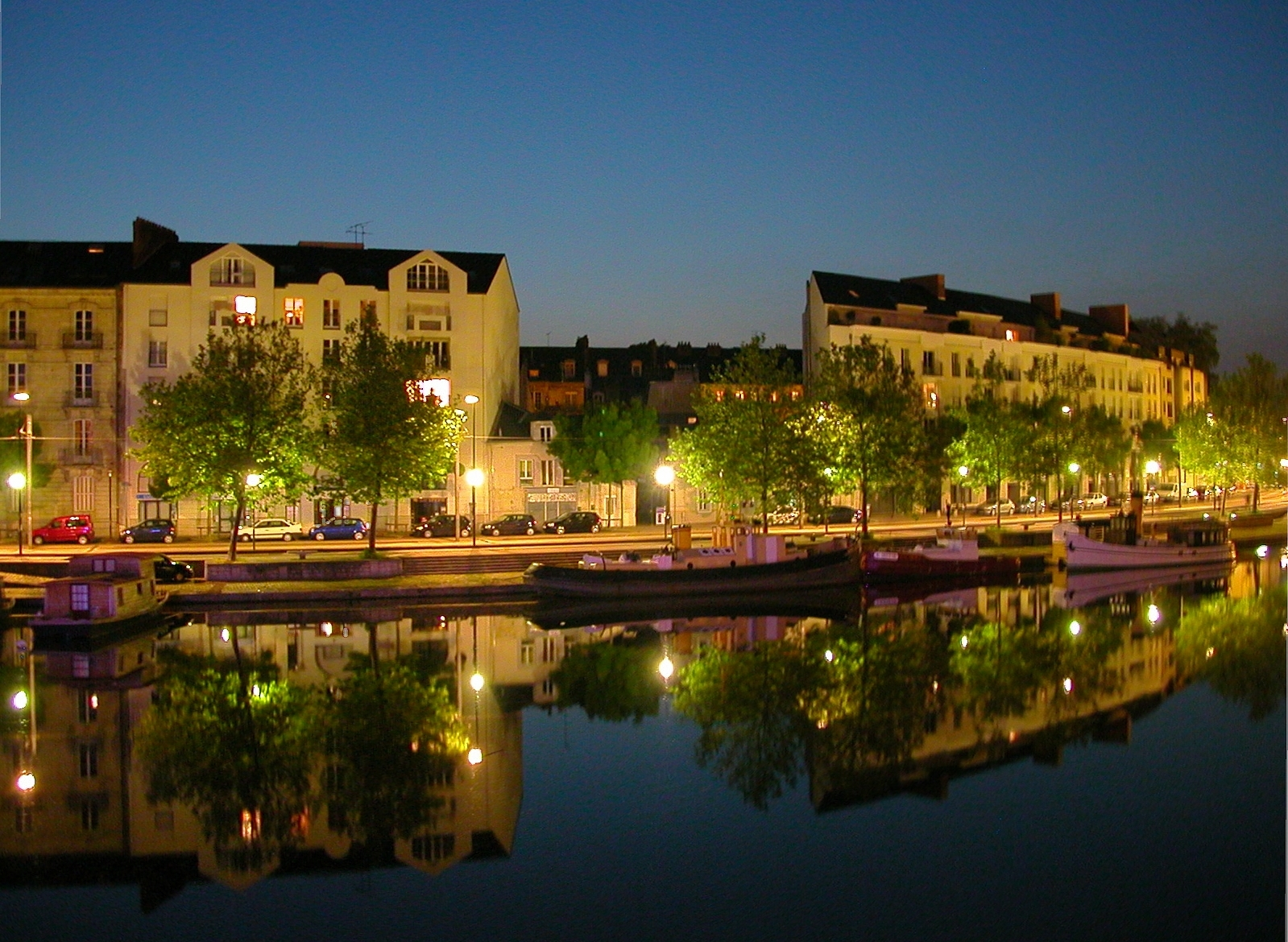 Bords de l'Erdre à Nantes de nuit : vue sur le quai de Versailles